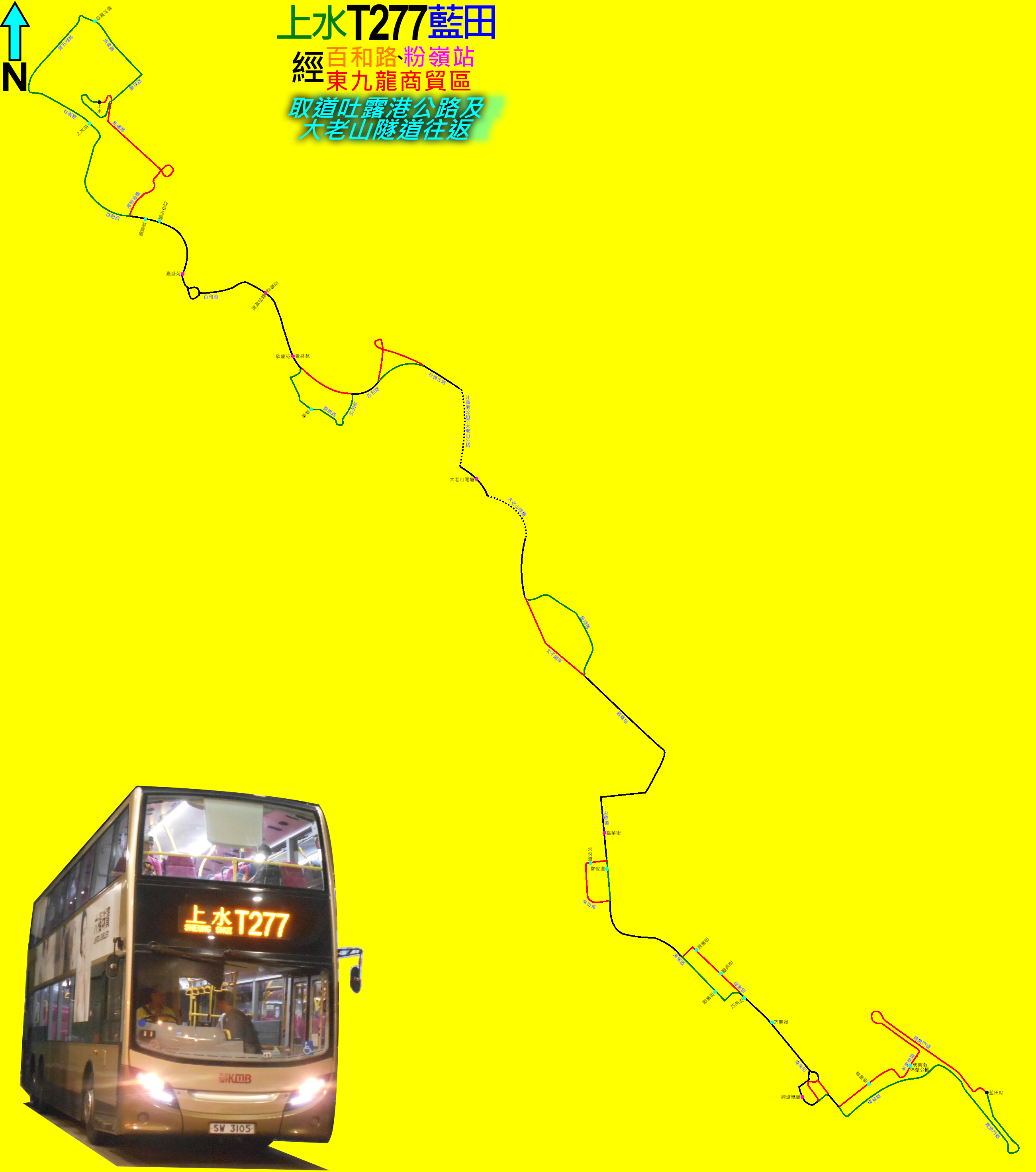 中文（香港）: 九巴T277線的走線圖